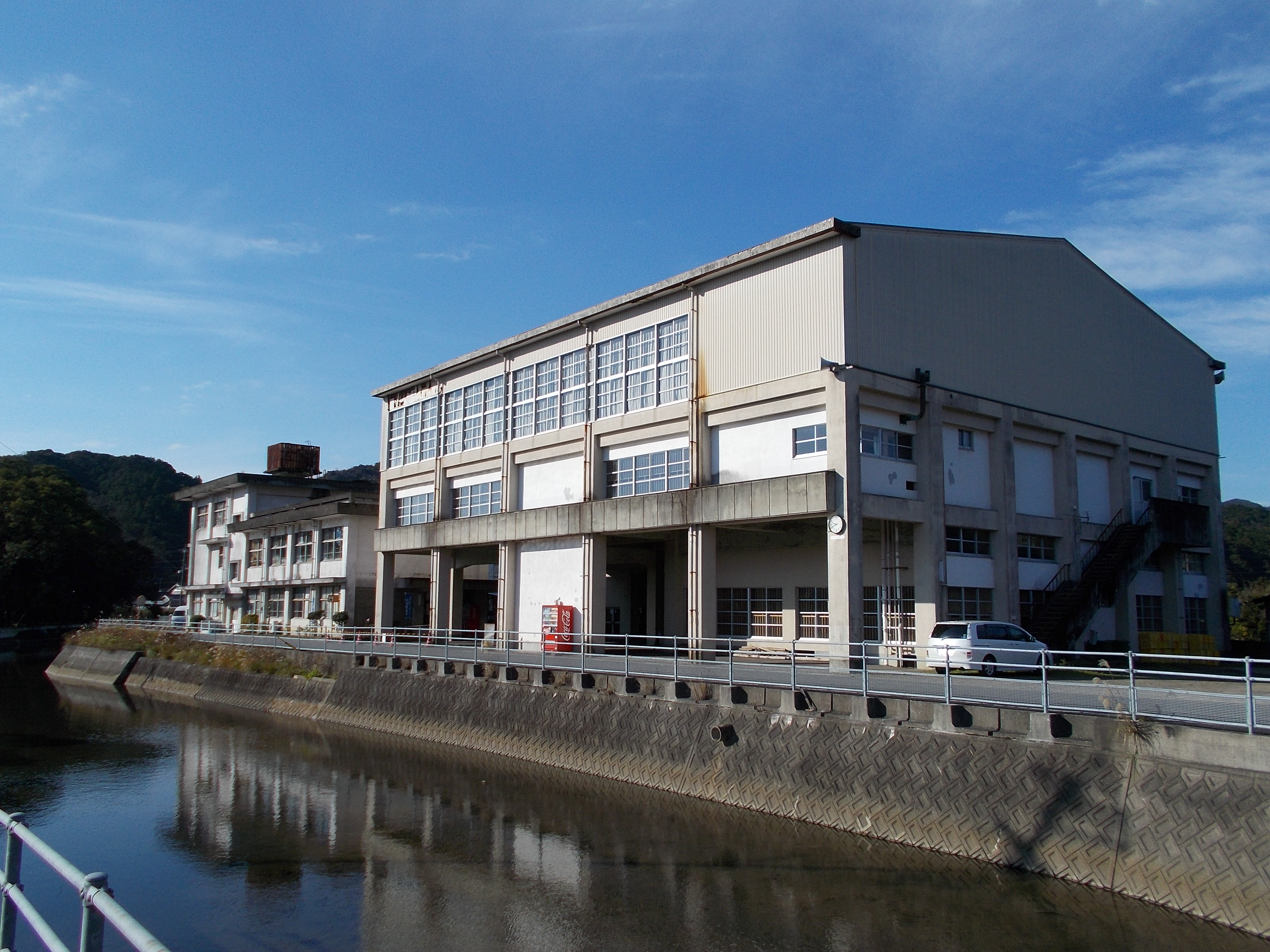 高知県立室戸高等学校甲浦分校